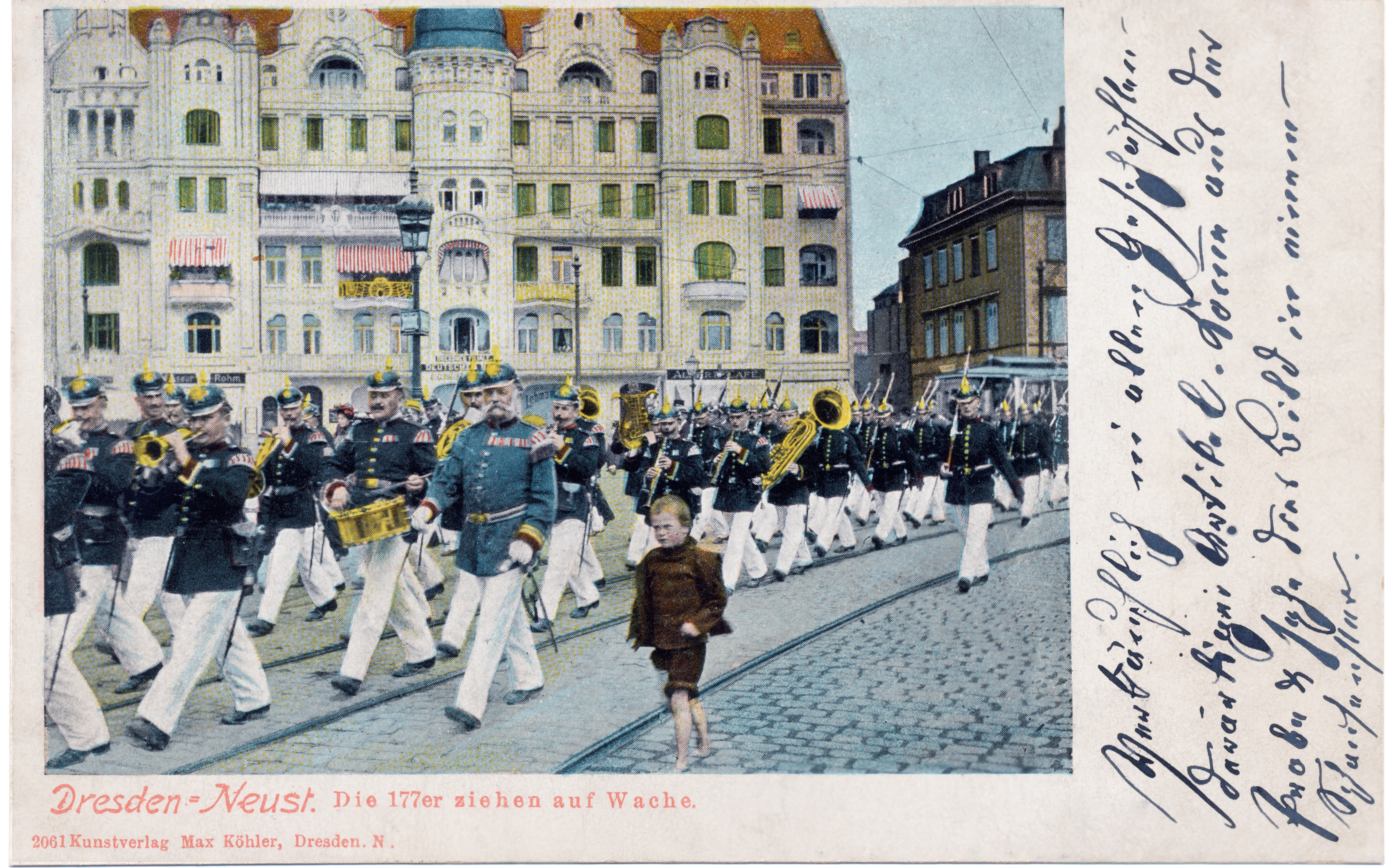 Heinrich Christoph Röpenack mit Kapelle des 12. Infanterieregiments Nr.177 am Albertplatz in Dresden, das tägliche Aufziehen der Wache, 1905